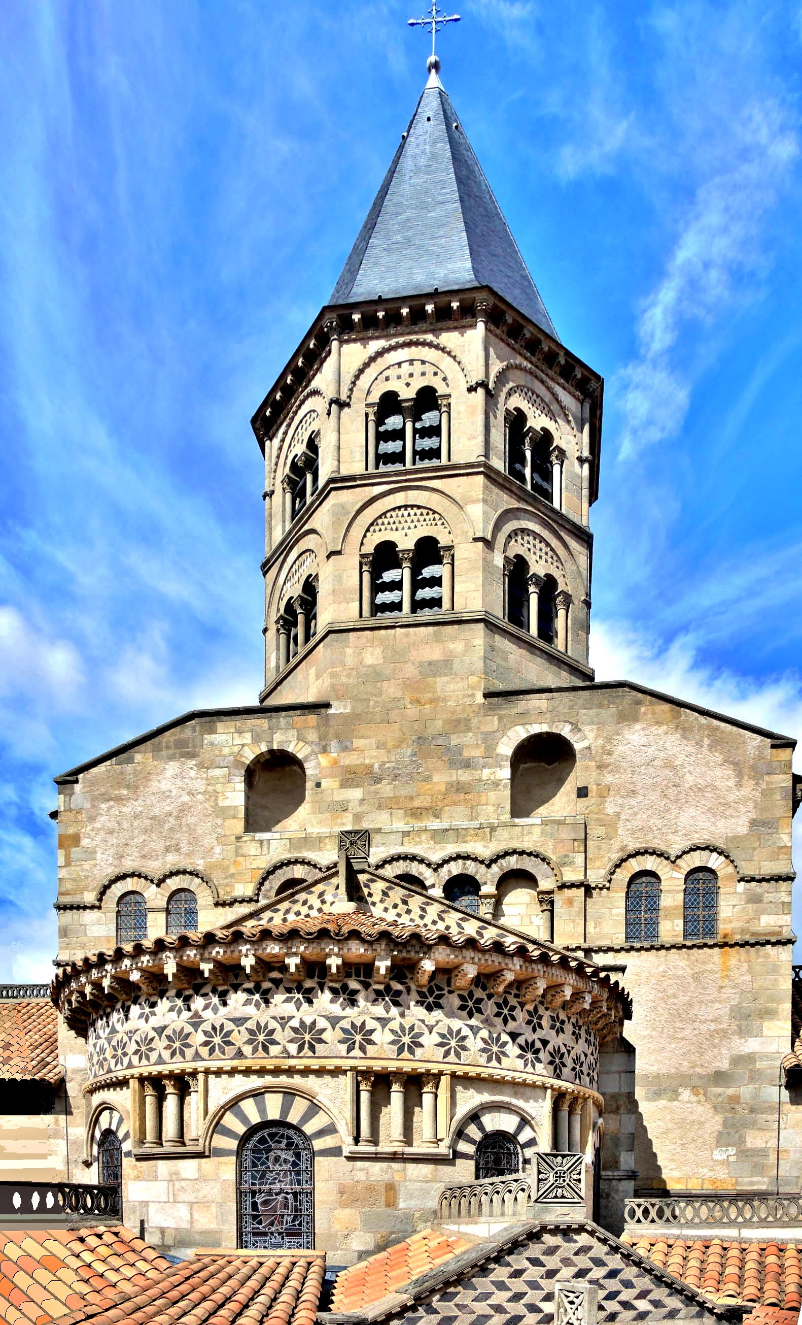 Chevet et clocher de Notre-Dame-du-Port, vus du belvédère. Clermont-Ferrand Puy-de-Dôme